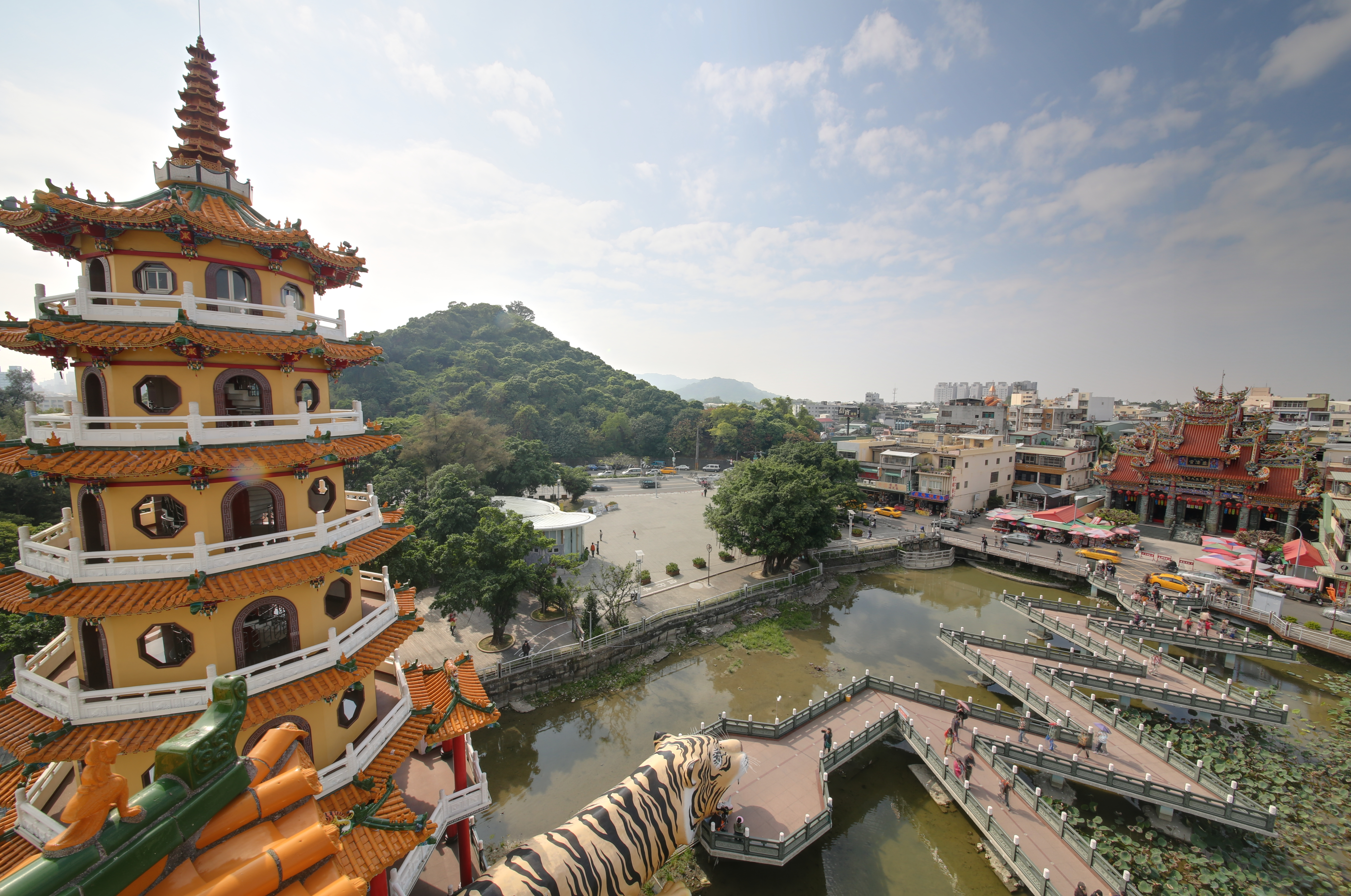 Zuoying District, Kaohsiung City, Taiwan 813